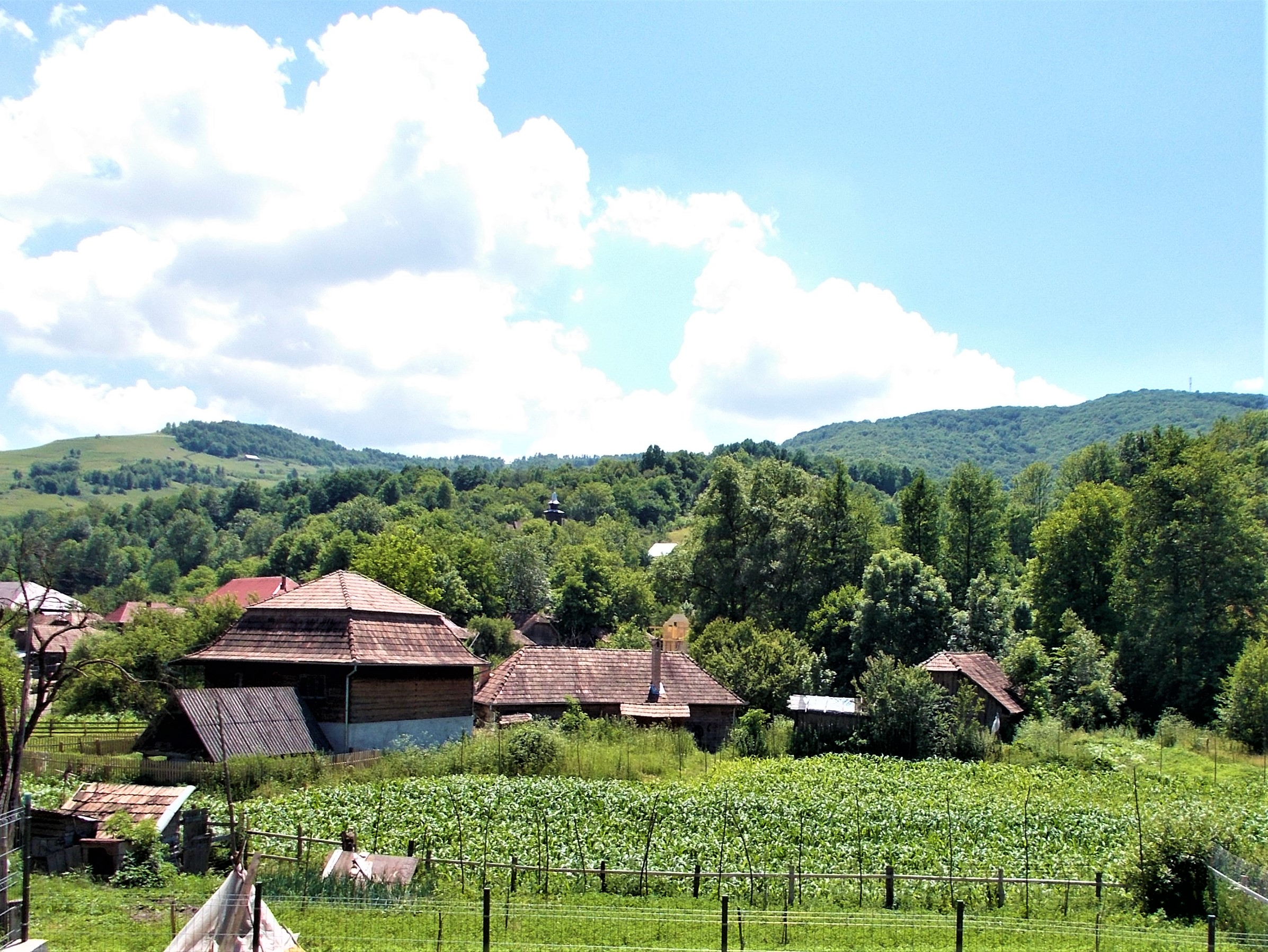 Satul Poșaga de Jos, județul Alba